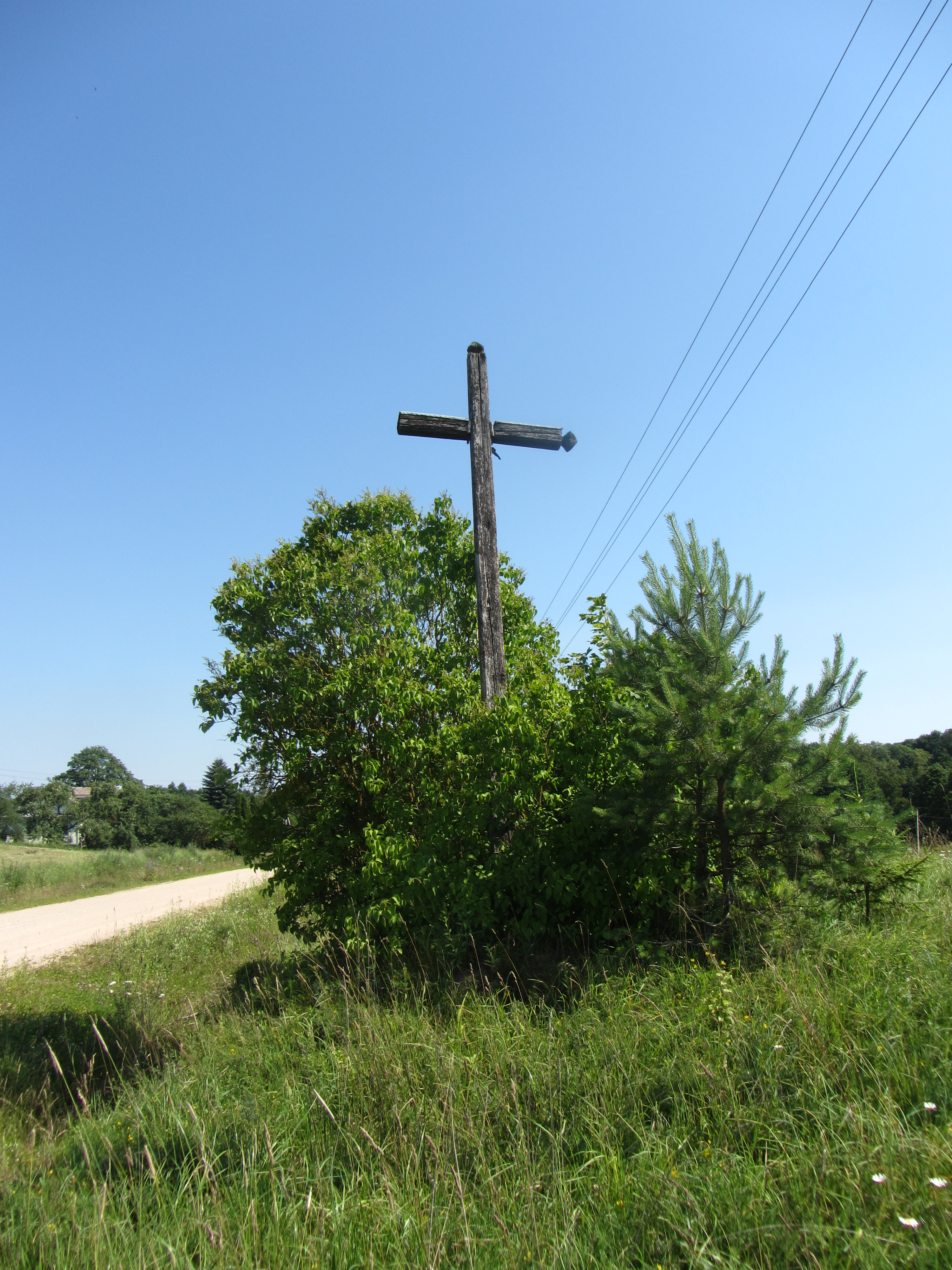 Dvarykščius 30258, Lithuania